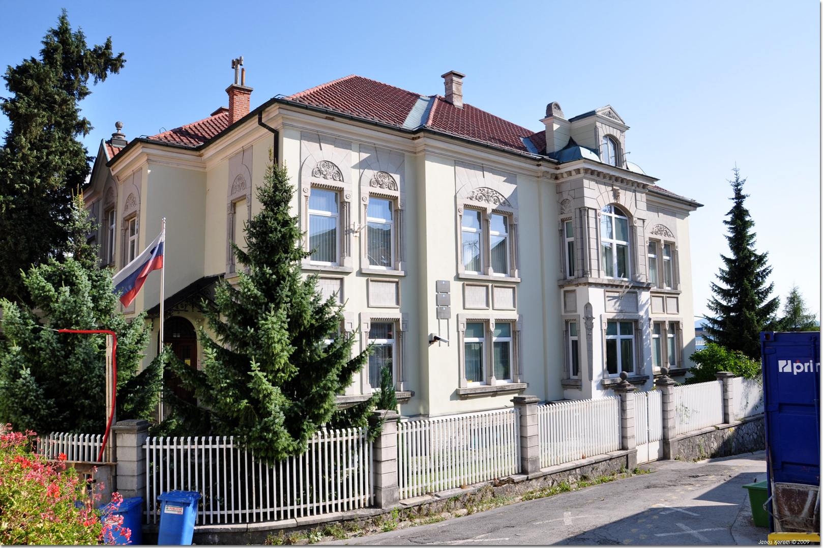 Postojna (109)